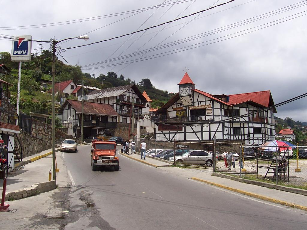 La Colonia Tovar es un lugar turístico de Venezuela en el municipio Tovar del Estado Aragua.